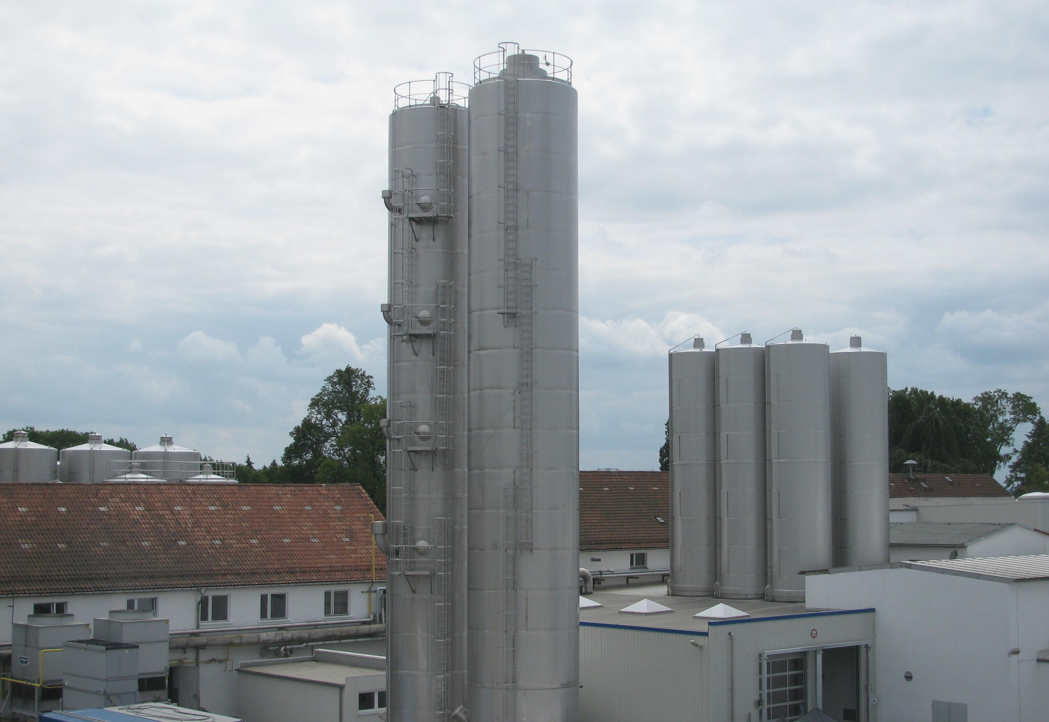 Gebäude der Heinrichsthaler Milchwerke, Radeberg